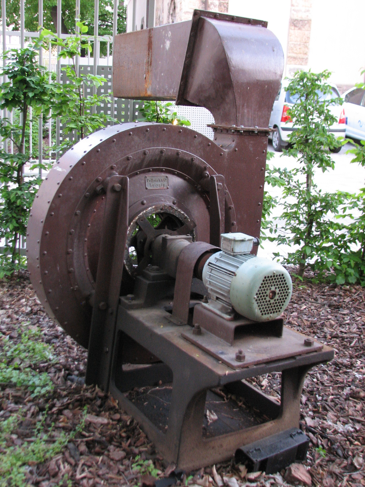 Ausgedientes originales Windwerk der Jehmlich-Orgel der Philippuskirche, ausgestellt auf dem Philippusgelände, Foto vom April 2019